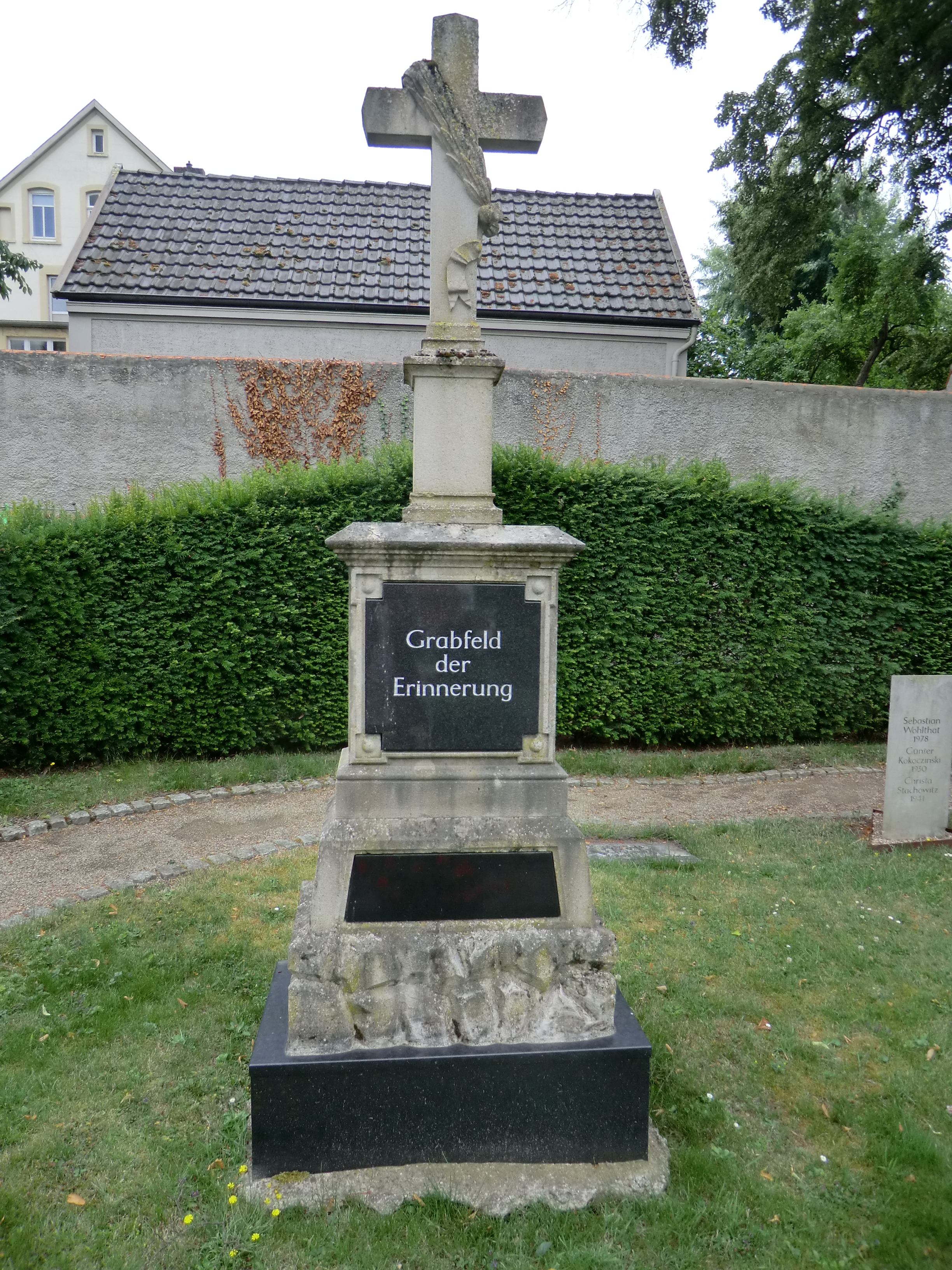 Grabfeld der Erinnerung. Ein Grabfeld für Obdachlose